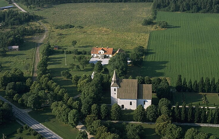 Motiv: Sjonhem kyrka Nyckelord: Flygbilder, Riksintressen Kategori: KyrkomiljöSjonhem kyrka